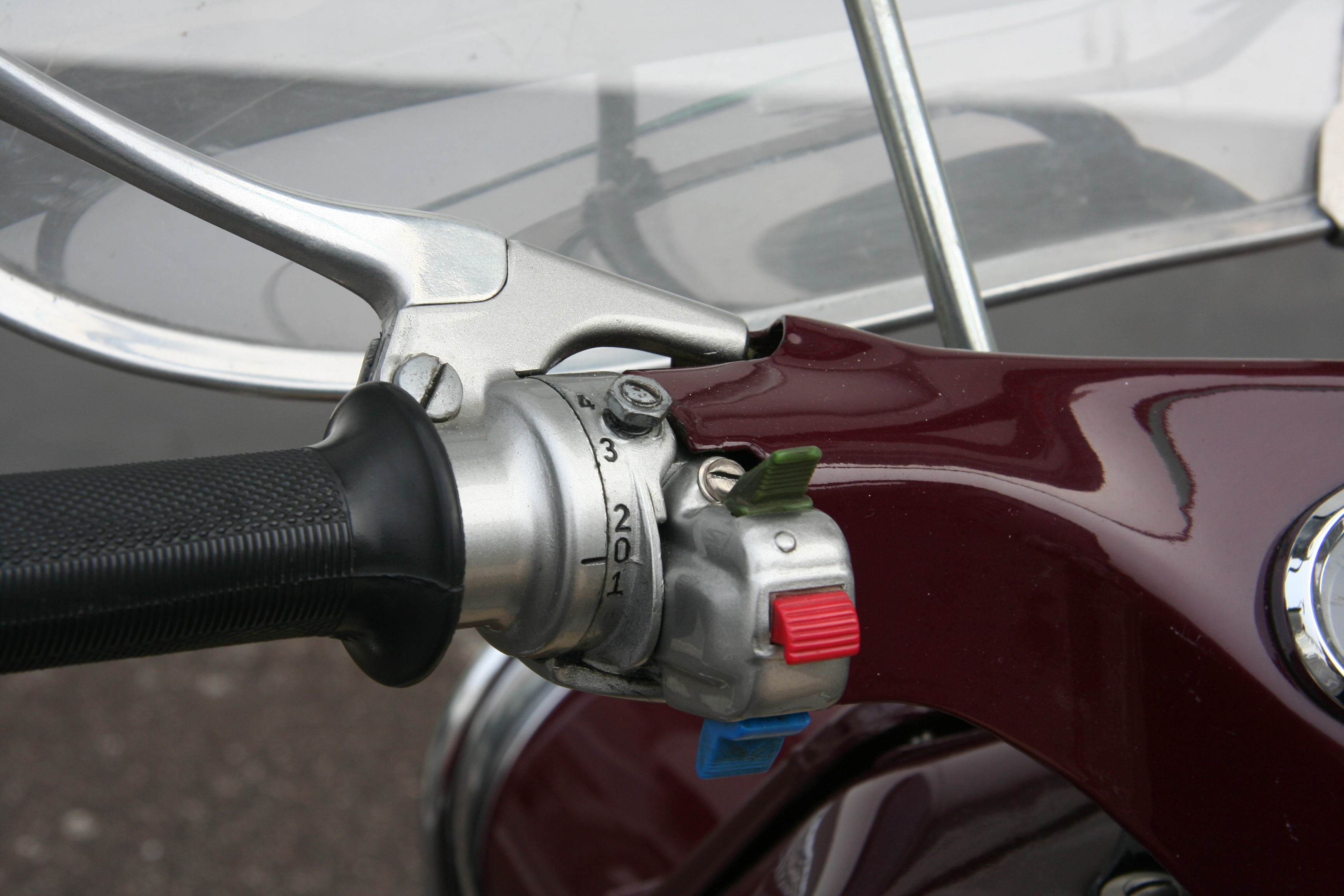 4-Gang-Drehgriffschaltung des Heinkel Tourist 103 A2, Baujahr 1962